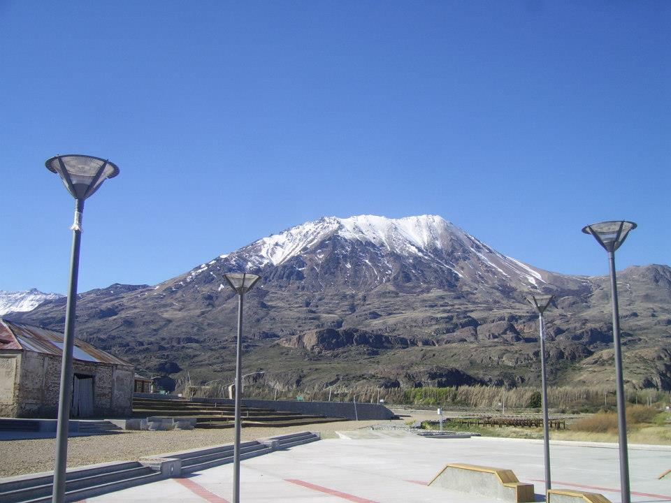 tomada con la montaña de fondo, la bodega un costado y farolesde marco This is a photo of a national monument in Chile: 2077